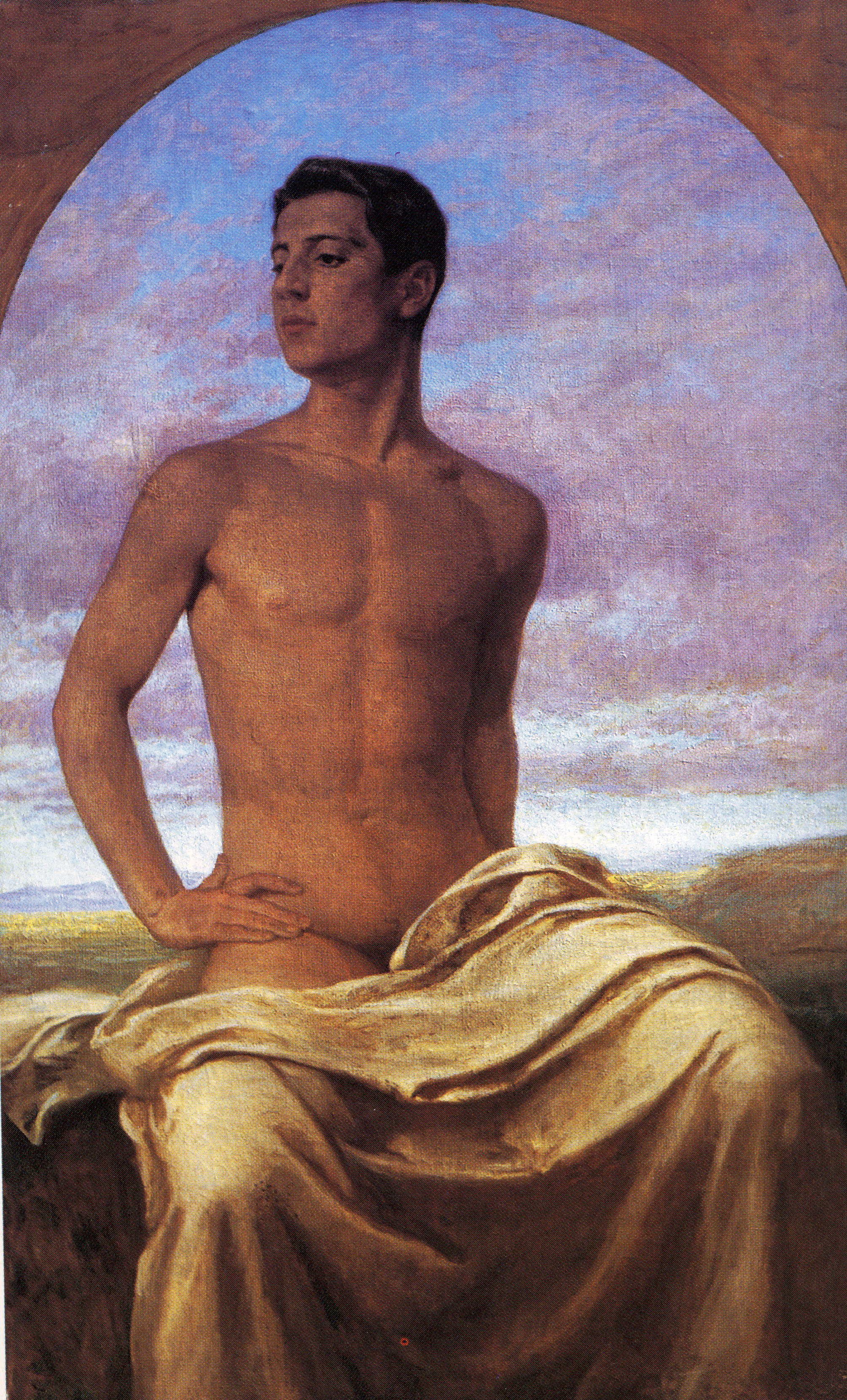 Nino.